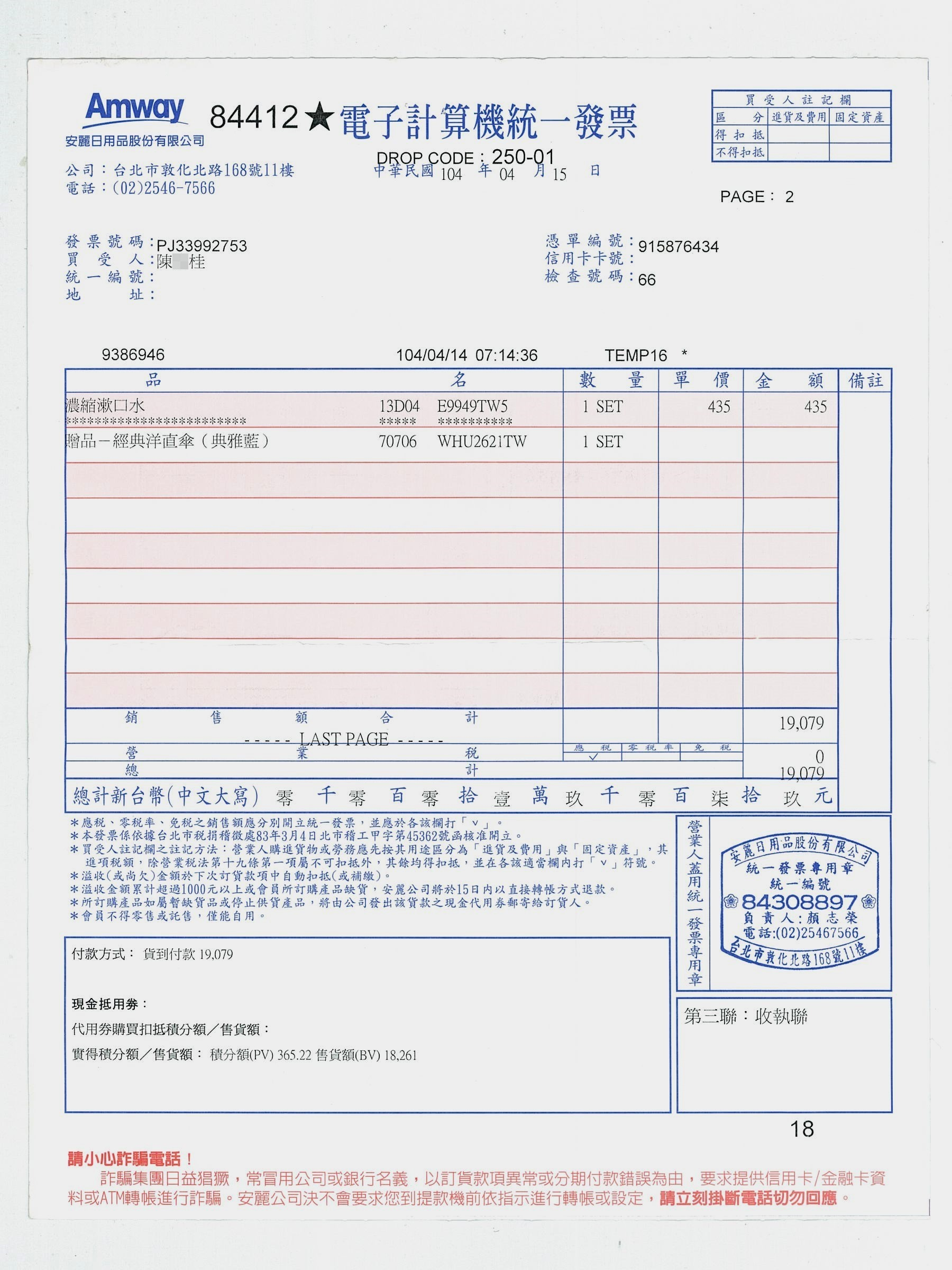 2015年4月15日安麗日用品開立的電子計算機統一發票。